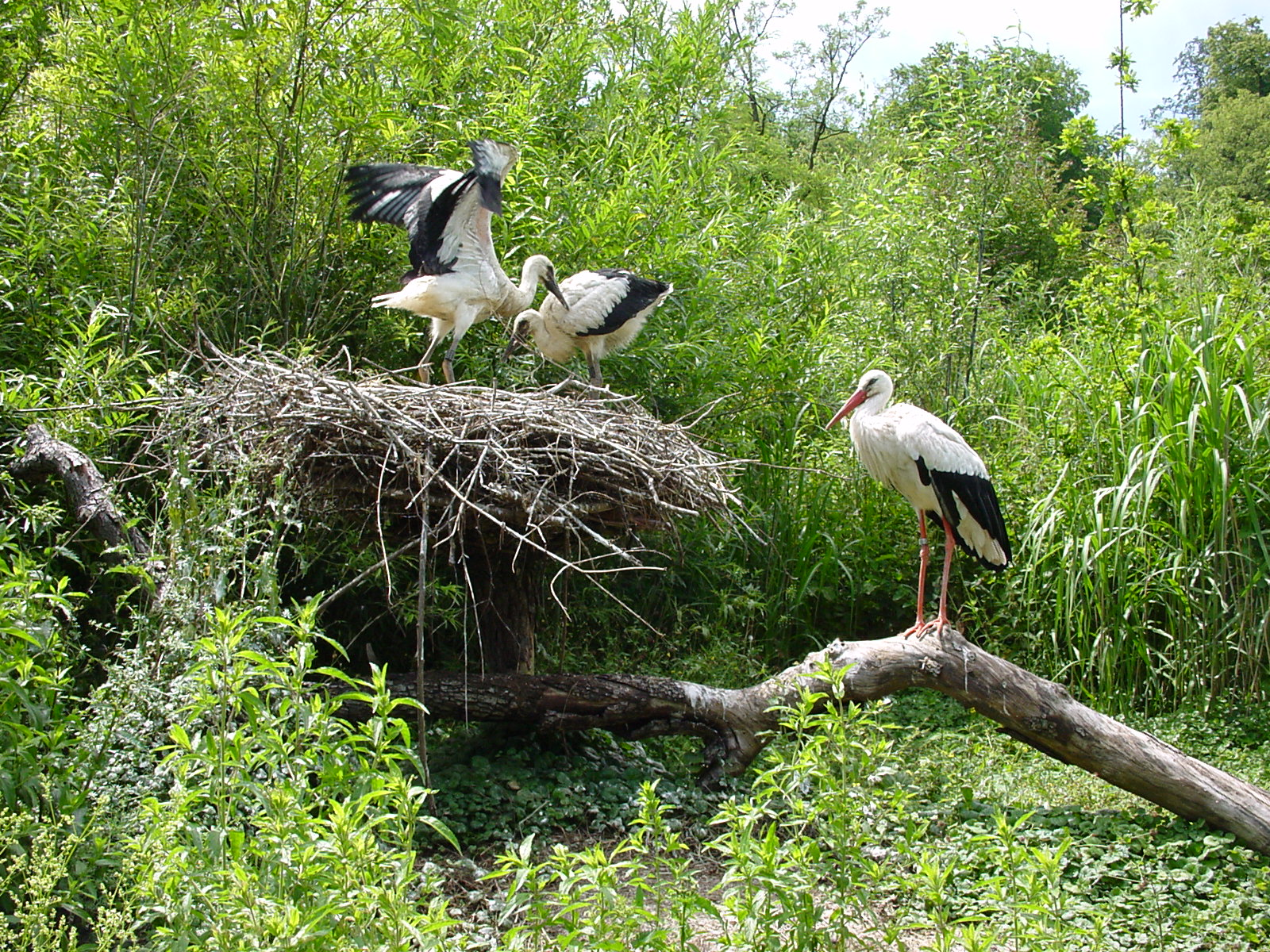 Zürich Zoo